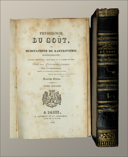 livre relié et ouvert